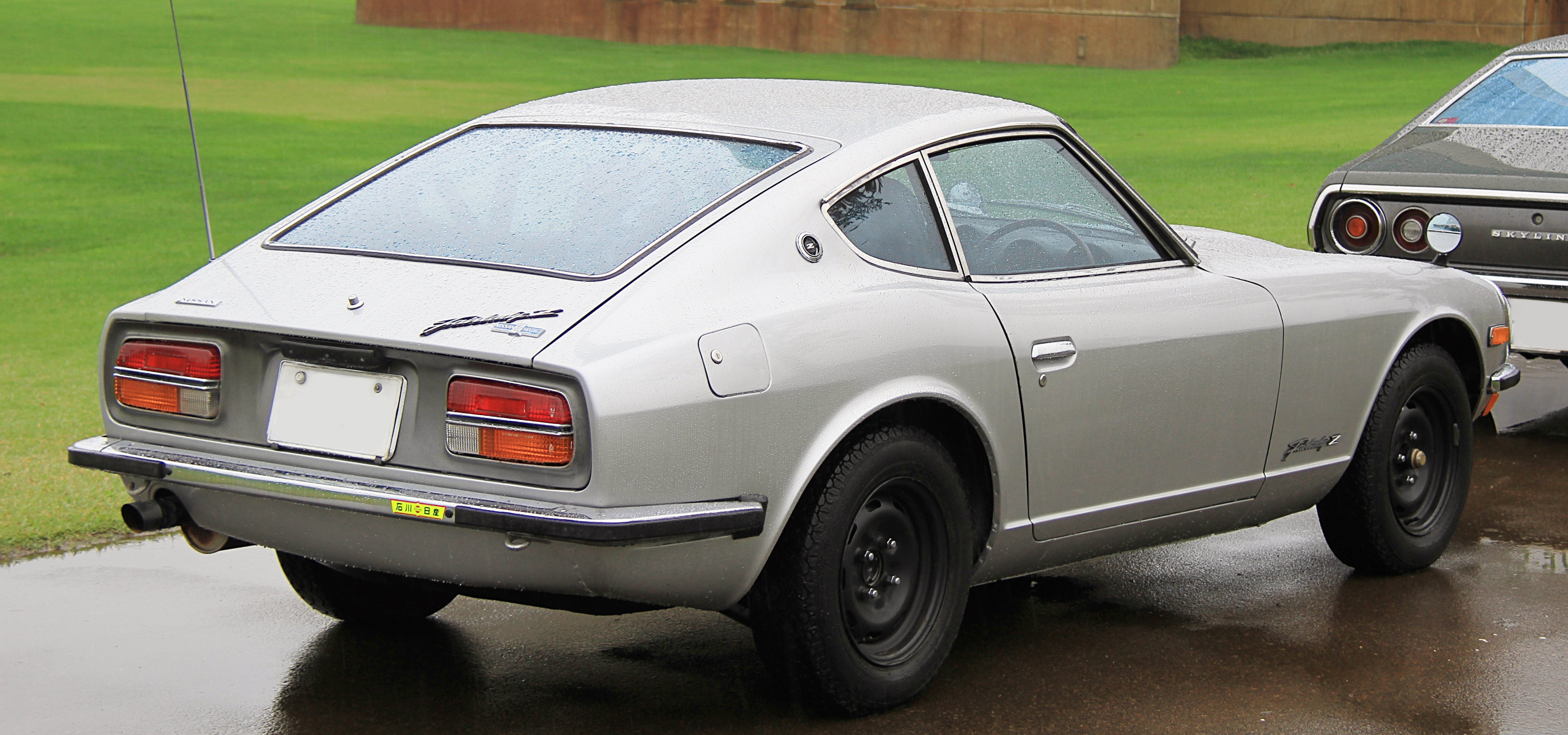 Nissan Fairlady Z AT